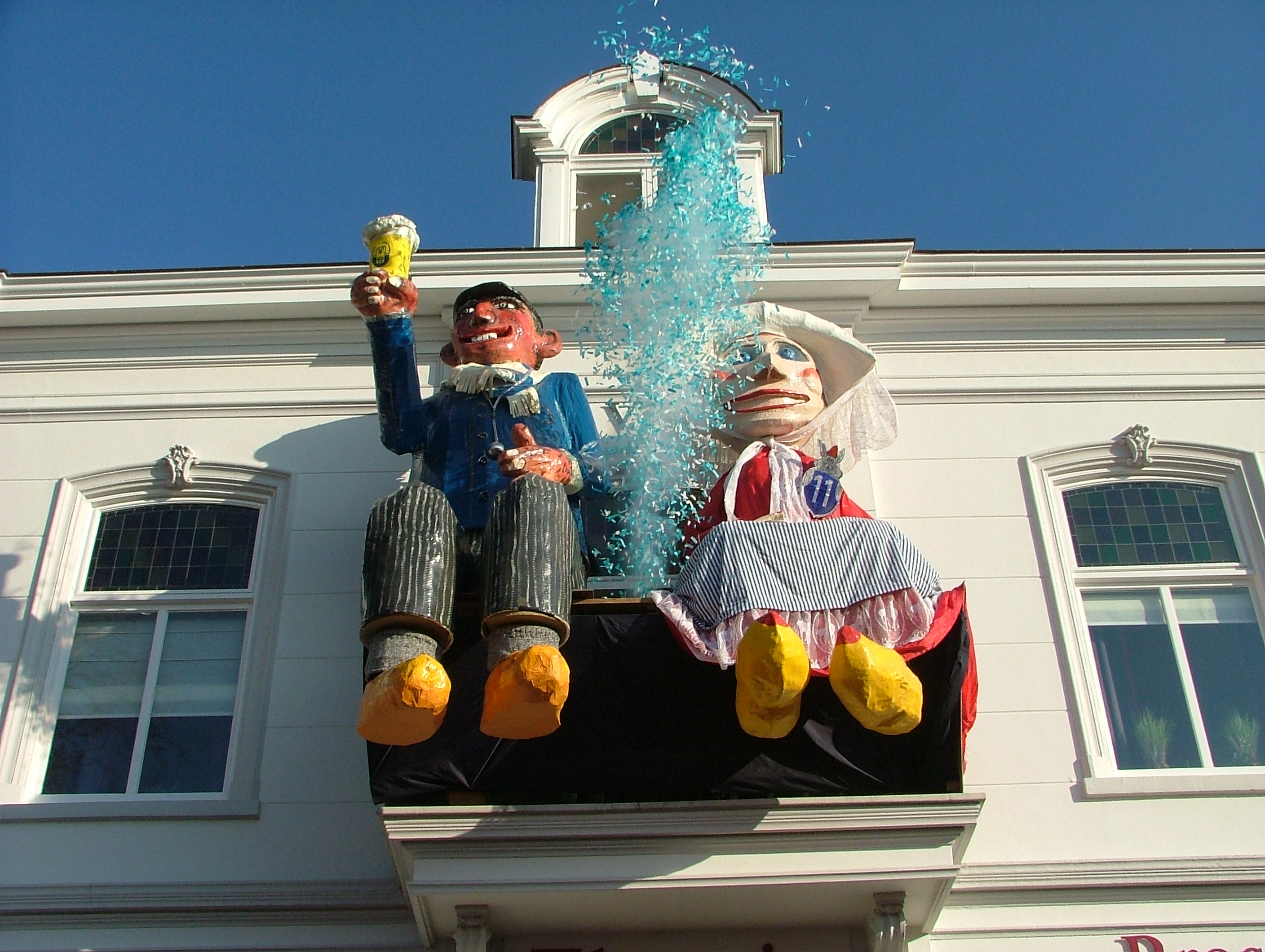 Eigen werk Geert C. Smulders, Rosmalen Hannus en Hanneke d'n Heiboer tijdens het carnaval in Zandhazendurp in 2006.